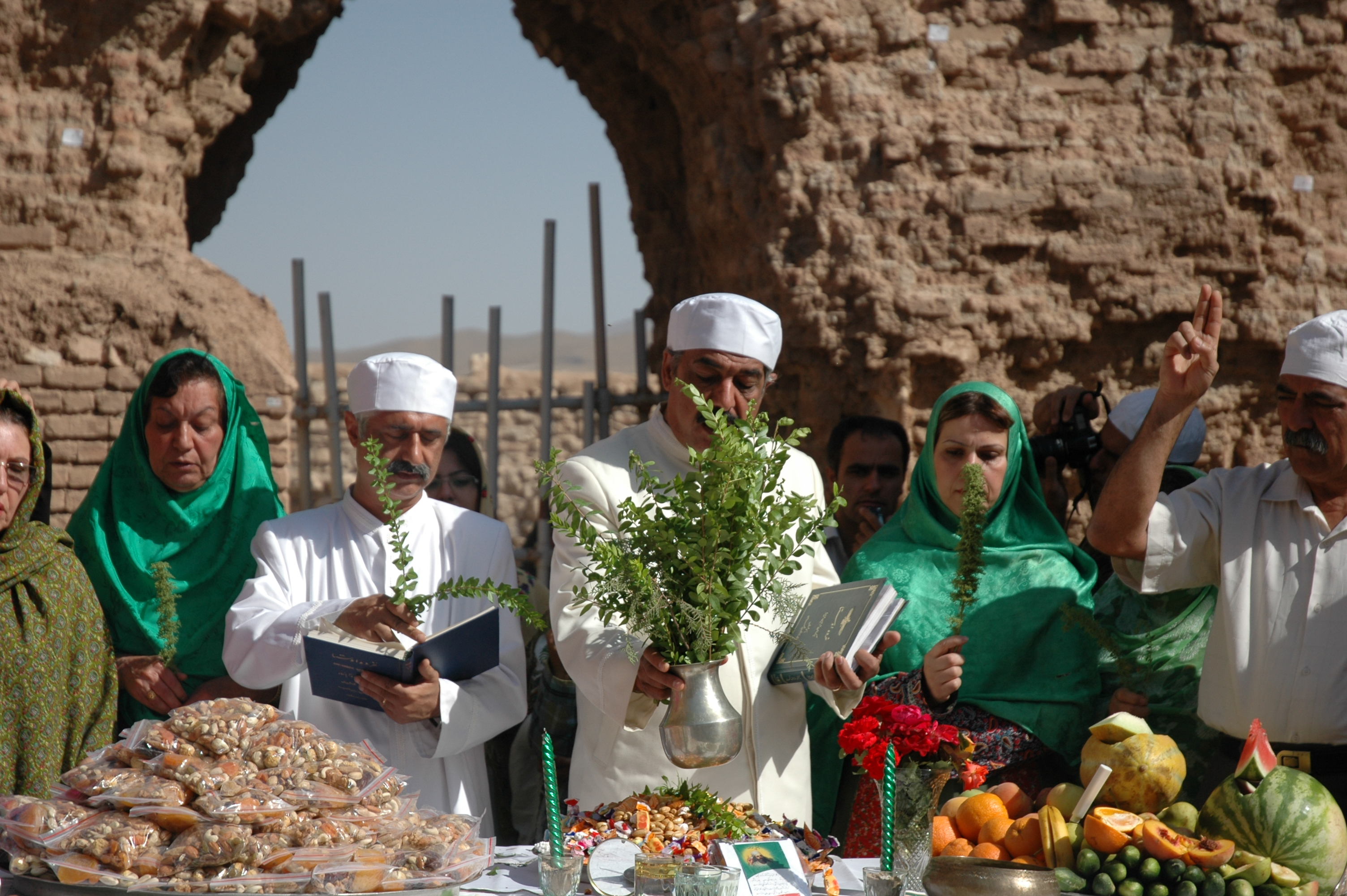 اجرای گاهنبار امرداد توسط موبد نیکنام در تخت سلیمان